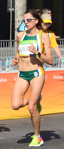 Passage du marathon des jeux olympiques de Rio 2016 dans le centre de Rio